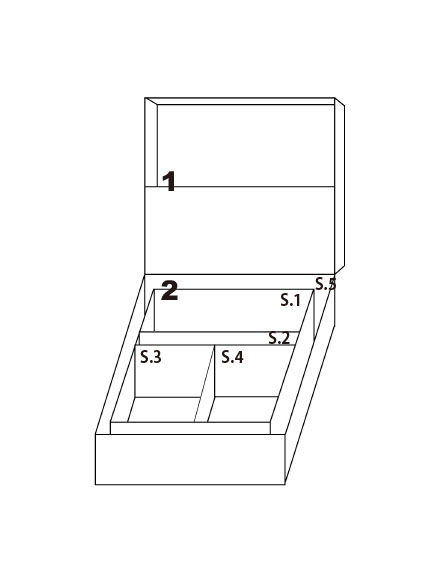 schema flux year box 2